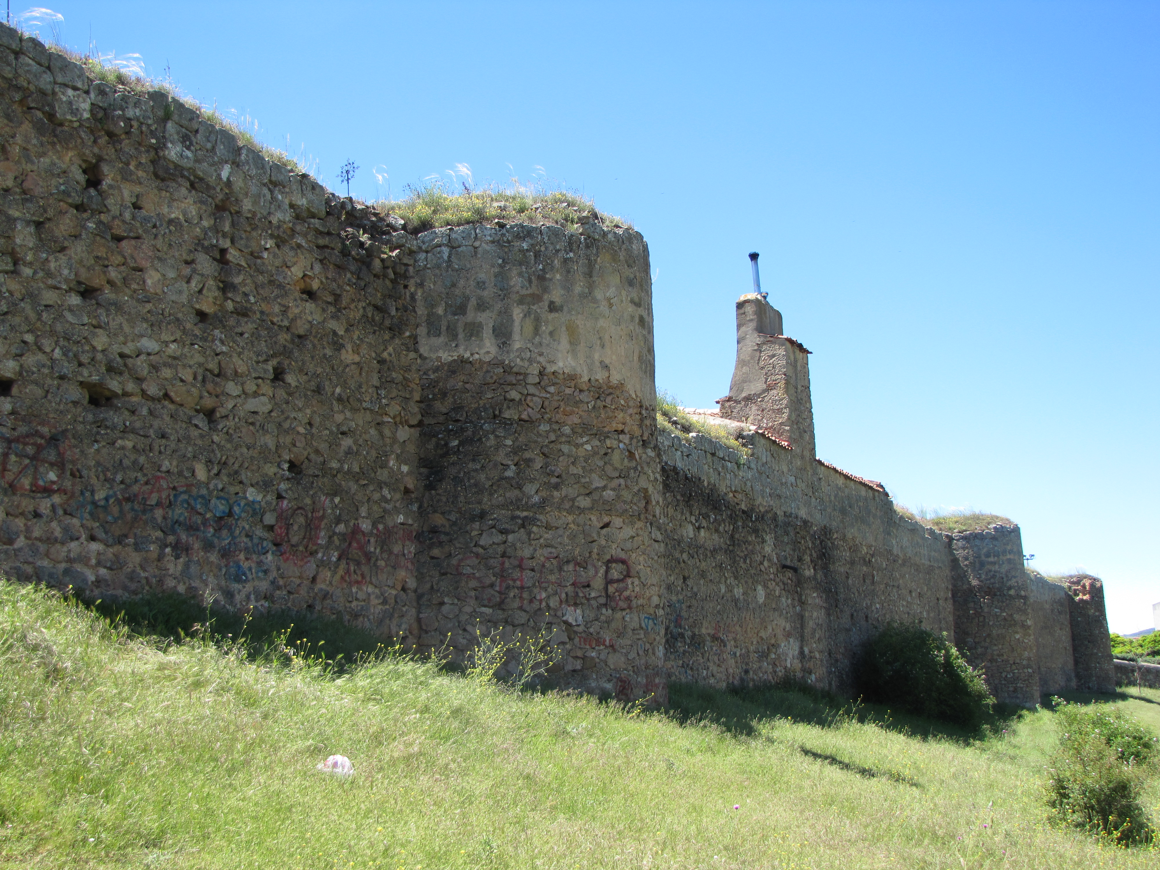 Muralla de Soria, tremo del Mirón.